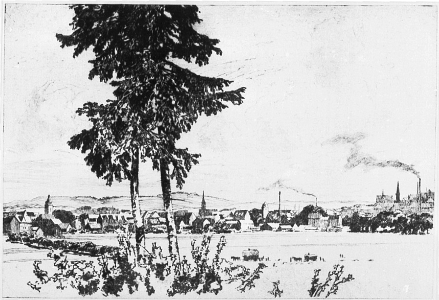 Ubbelohde, Otto (1867-1922): Ansicht der Stadt Gießen, 1919, Radierung/Druck, Marburg, Universitätsmuseum